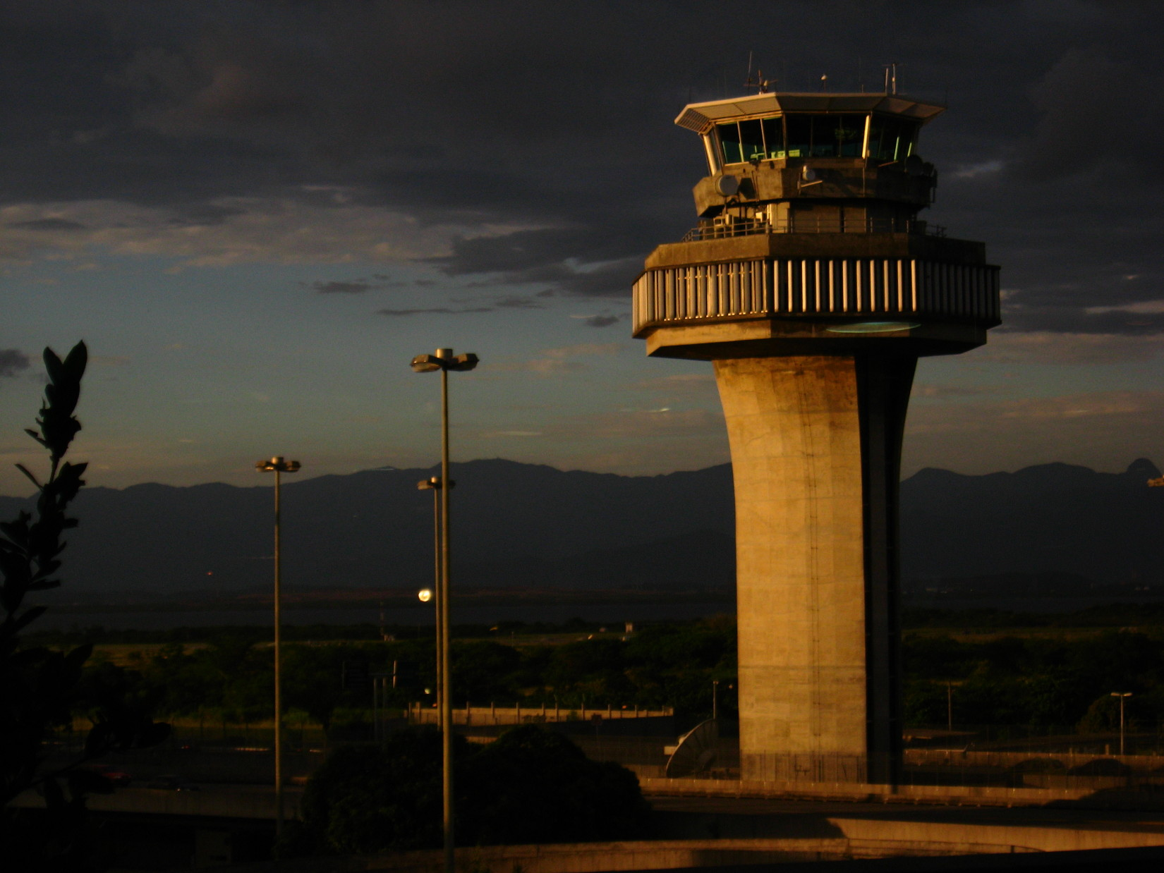 Torre de controle do aeroporto internacional do Rio de Janeiro (Galeão). Control tower of the international airport of Rio de Janeiro (Galeão).